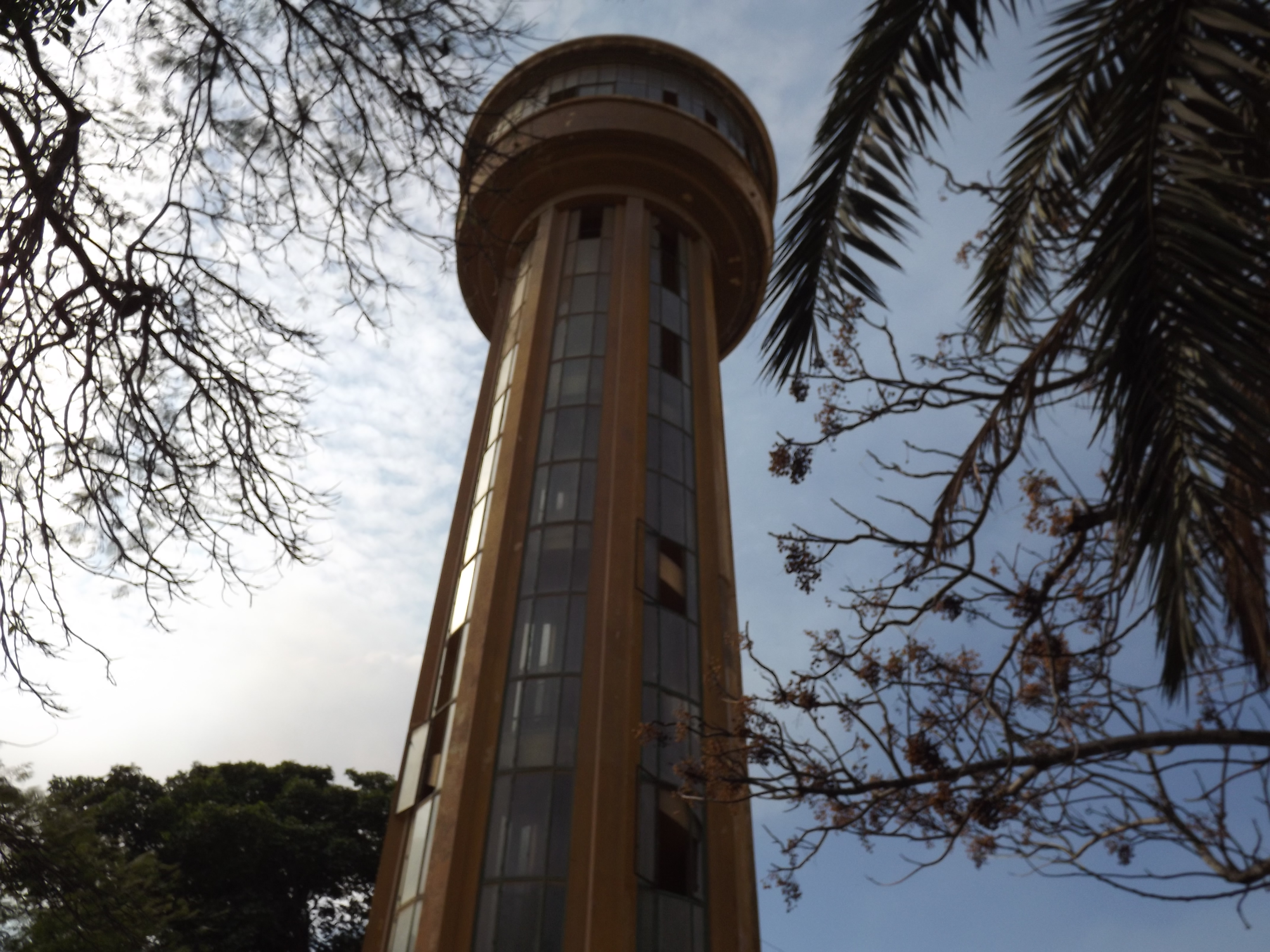 حديقة حيوان النزهة - الاسكندرية